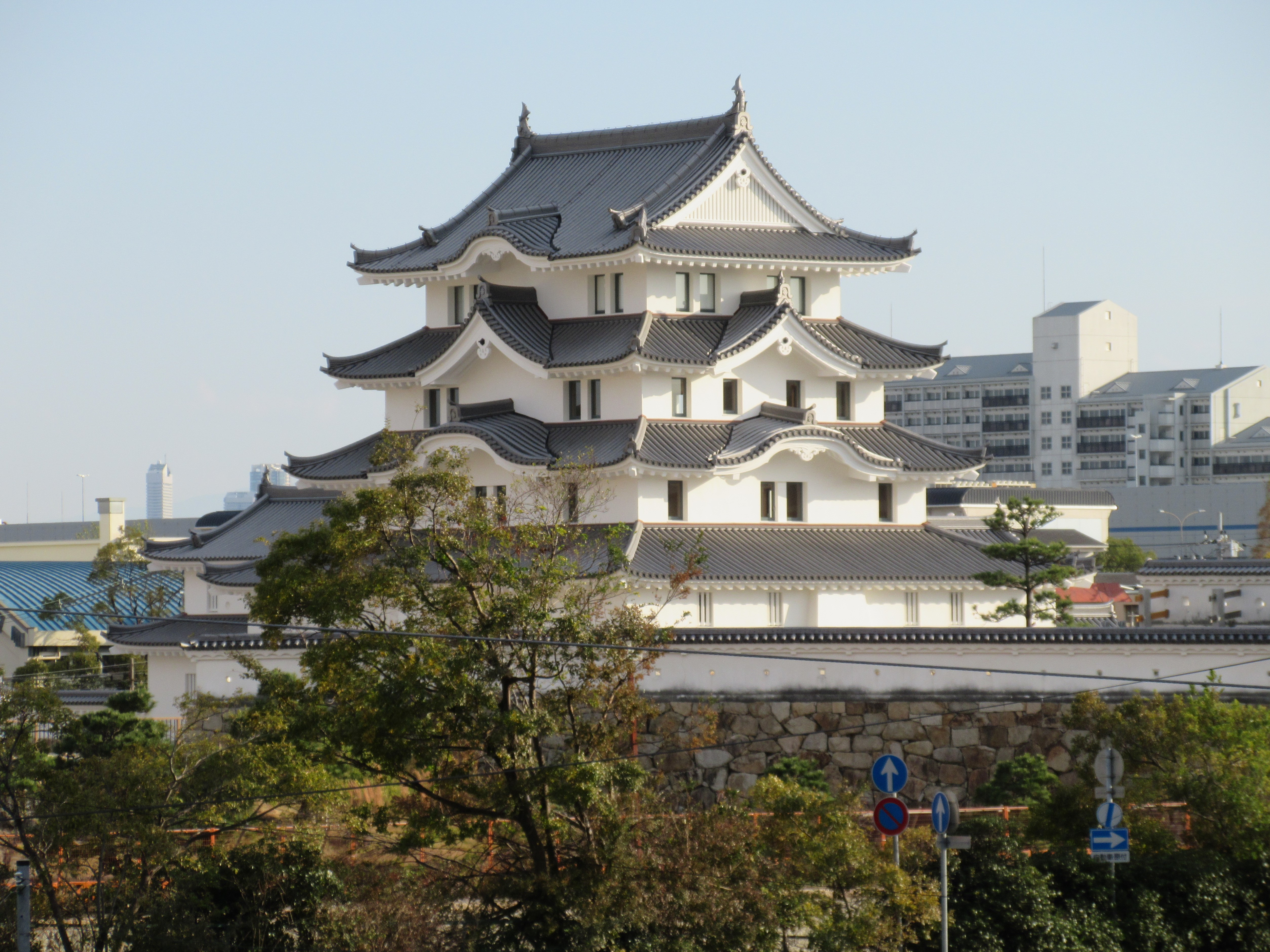 尼崎城天守閣（2018年11月25日撮影）